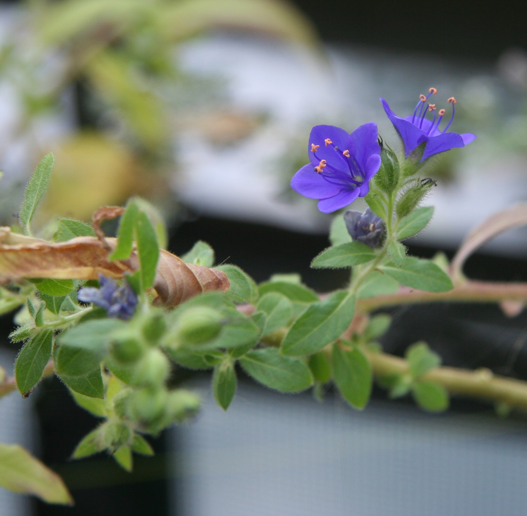 Hydrolea spinosa im Botanischen Garten Dresden